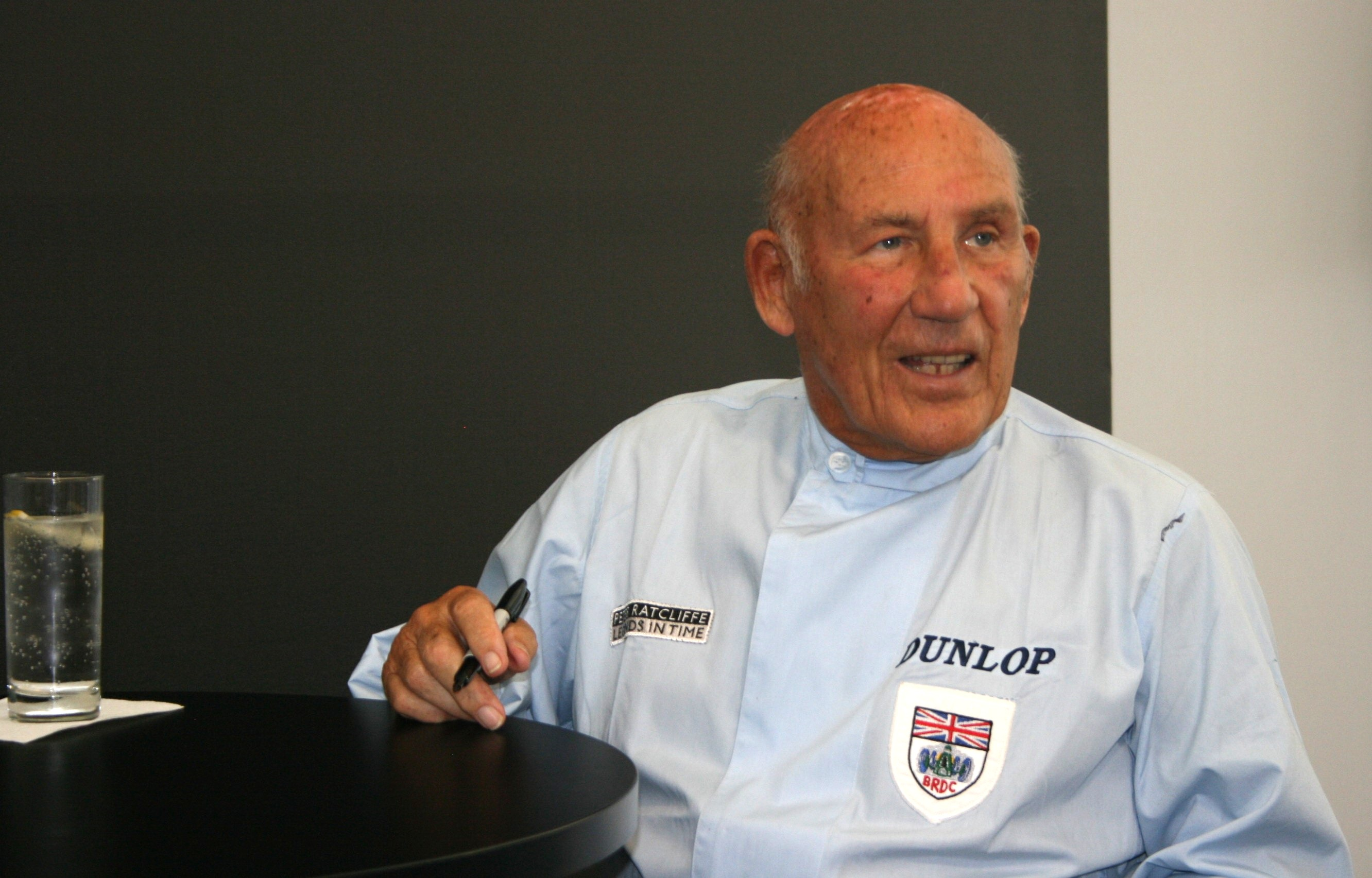 Sir Stirling Moss